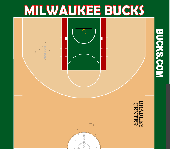 バックスホームコート配色